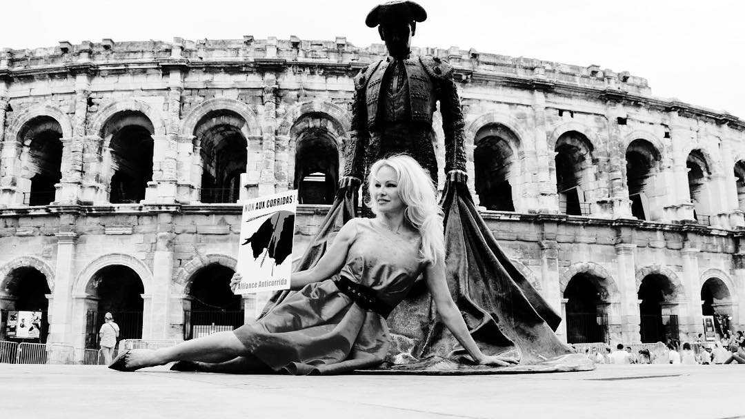 Pamela Anderson posant devant la statue de Nimeño II arborant une affiche contre la corrida